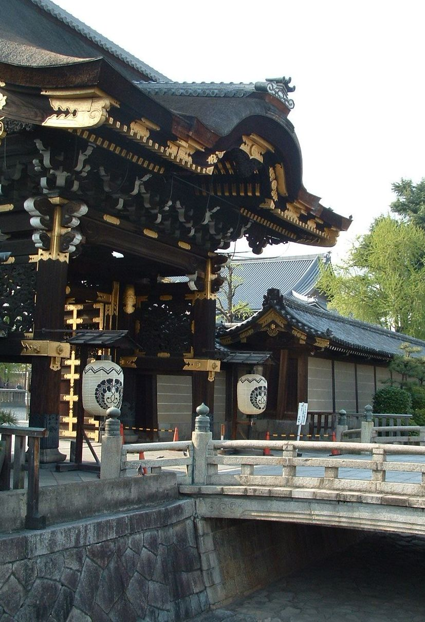 Nishi Hongwanji Gate